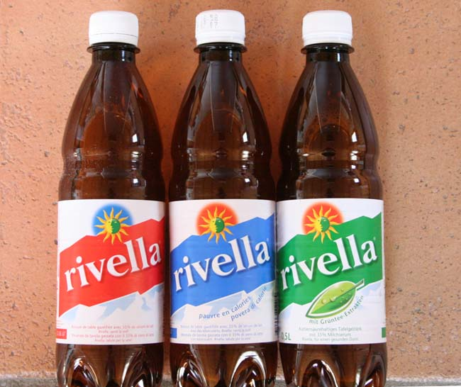 Rivella_rot_blau_grün